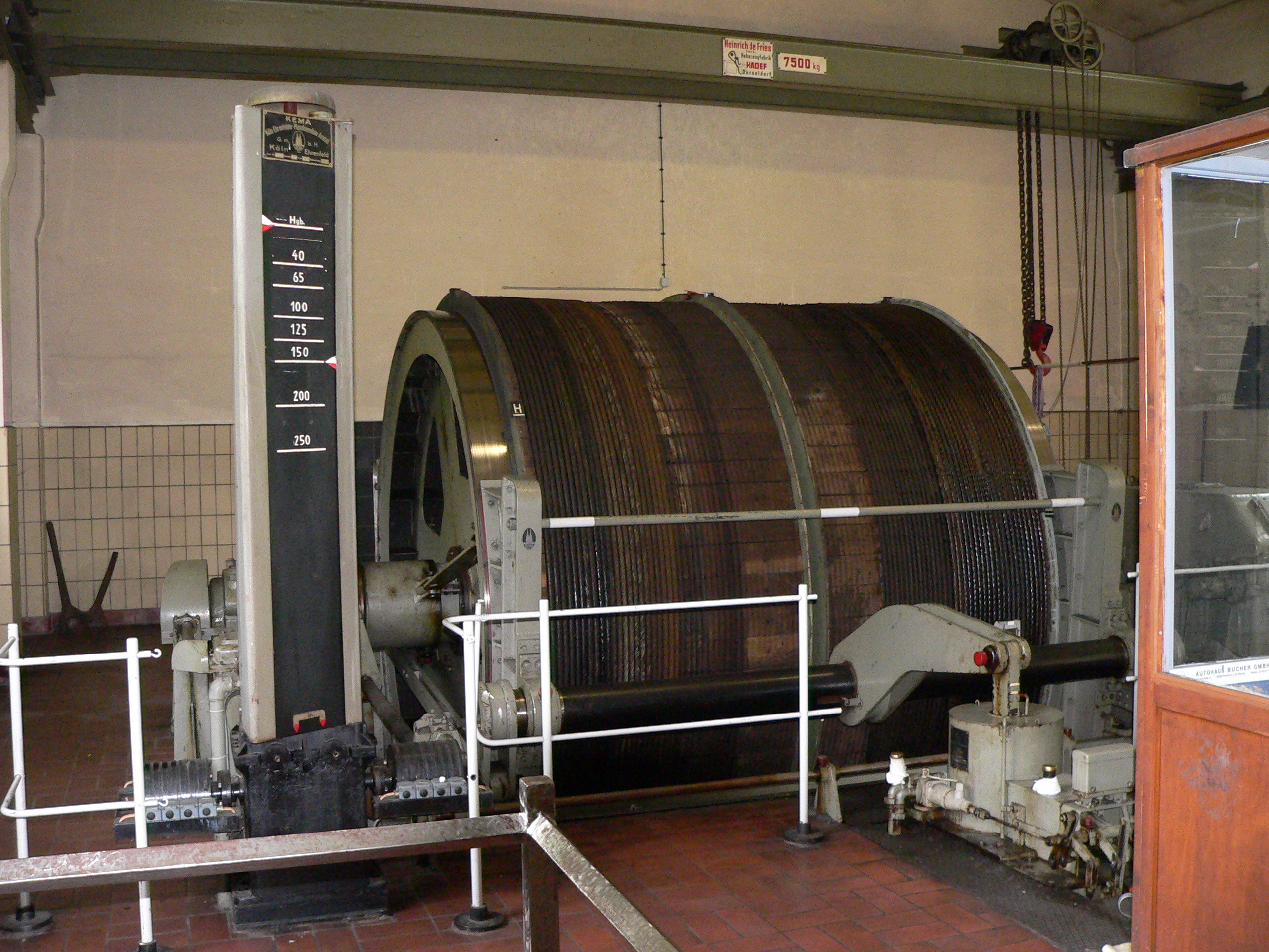 Fördermaschine, Trommelförderung, Grube Fortuna bei Wetzlar, Deutschland